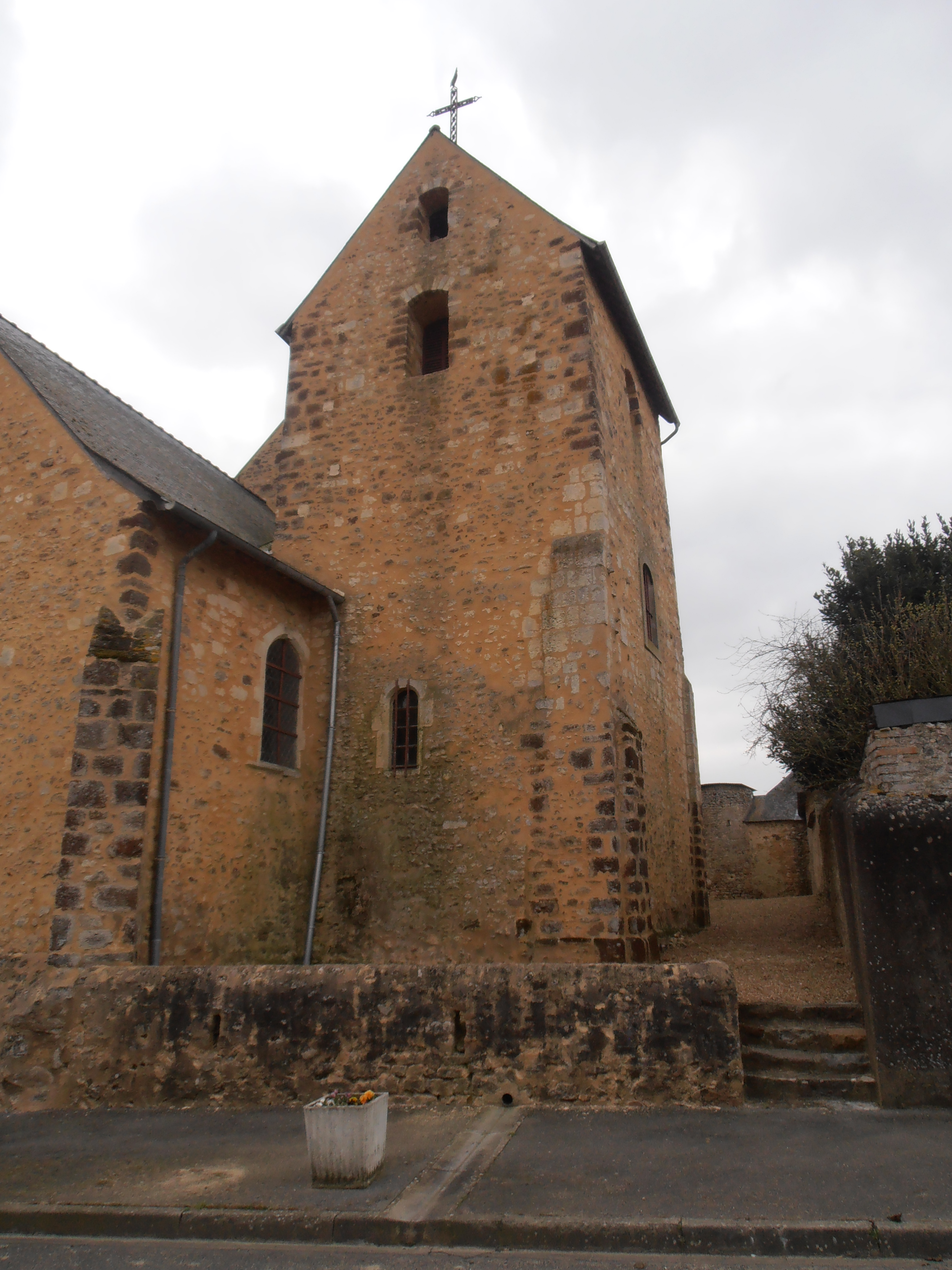 Le clocher de l'église de Saint-Ouen en Champagne